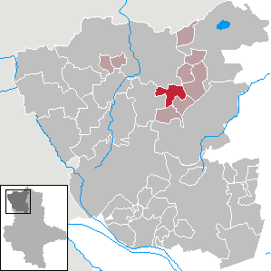 (Original text: Jeggeleben im Altmarkkreis Salzwedel)